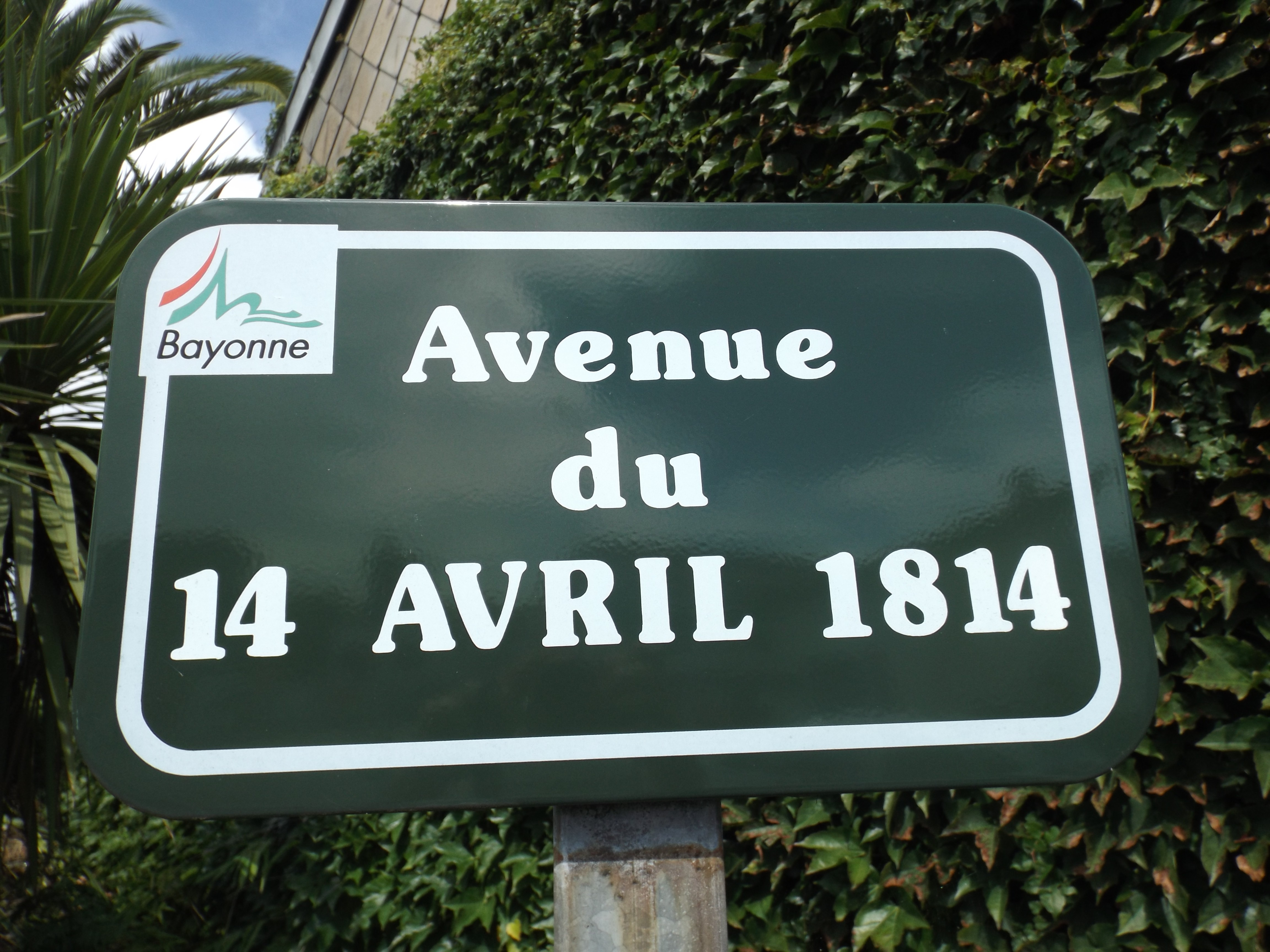 Plaque avenue du 14 avril 1814 bayonne